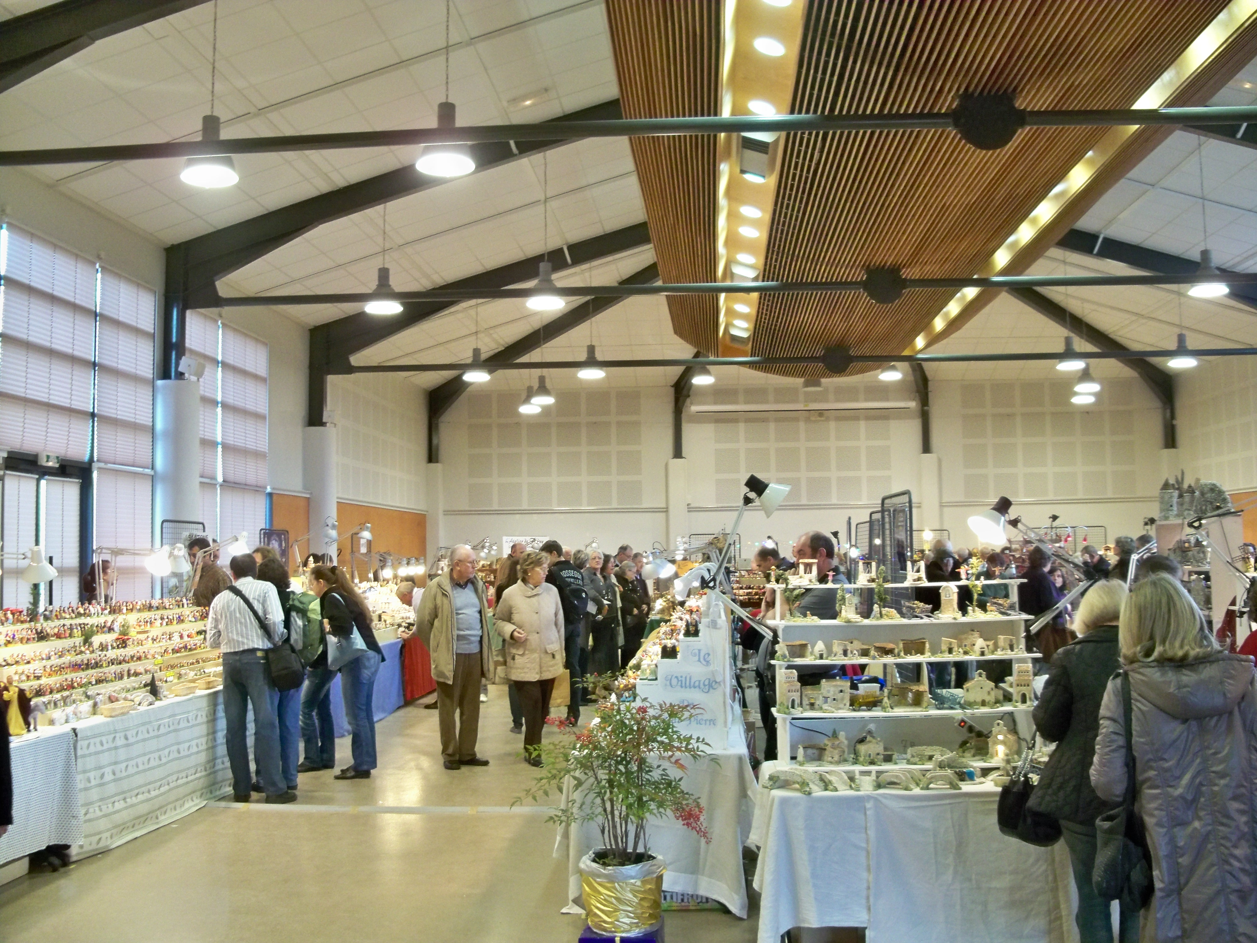 Foire aux santons du marché de noël de Fontvieille, Bouche du Rhône, France